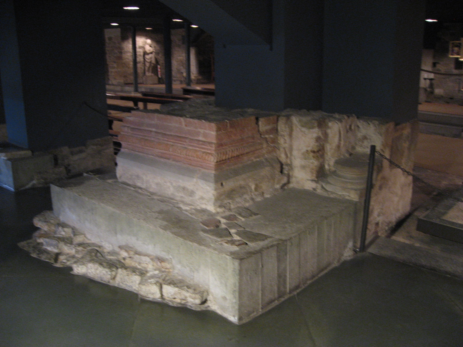 Inside Santa Maria del Fiore (Florence)